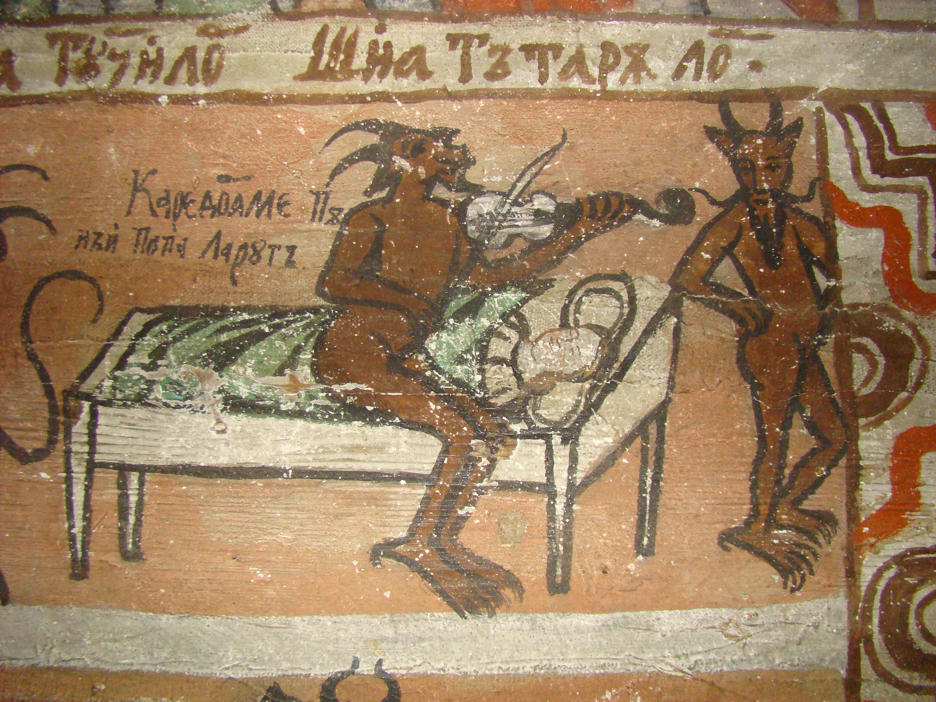 Biserica de lemn "Cuvioasa Paraschiva" , sat POIENILE IZEI; pronaos - detaliu din Judecata de Apoi